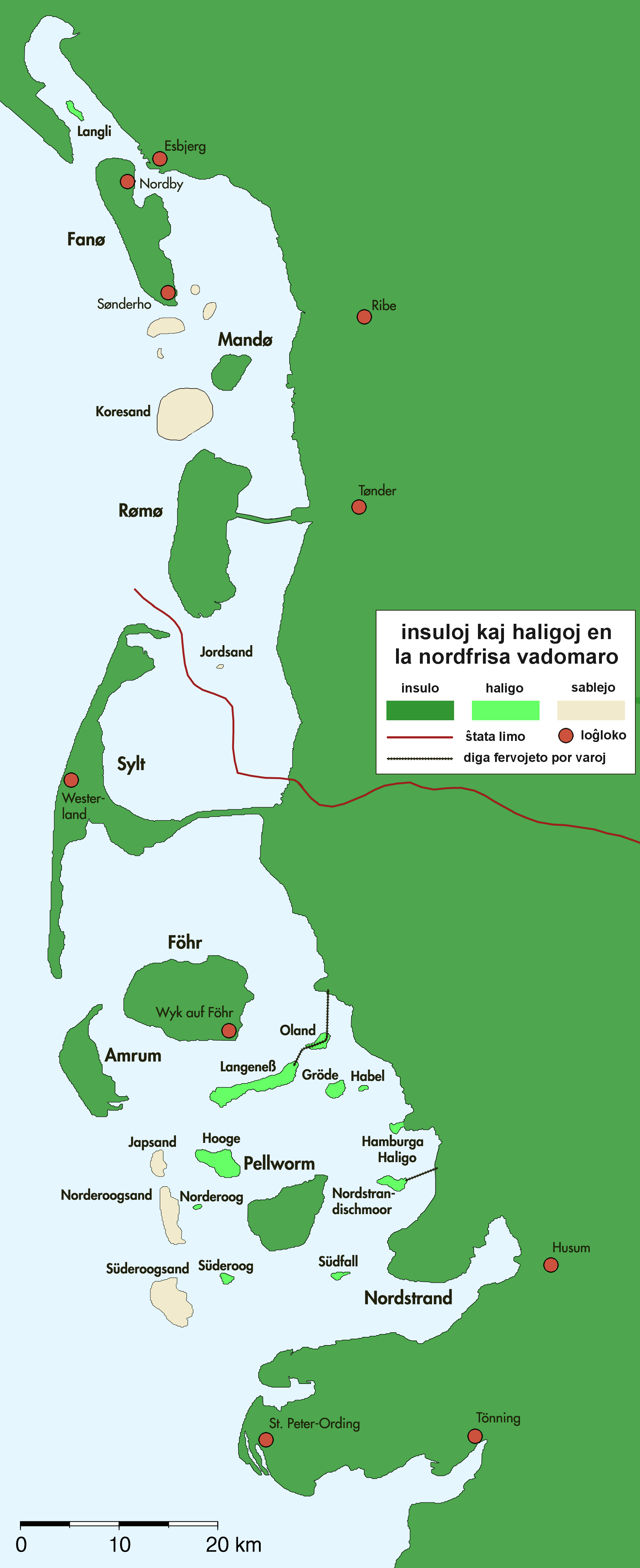 Situo de la nordfrisa vadomaro kun insuloj, haligoj kaj sablejoj - priskriboj en Esperanto